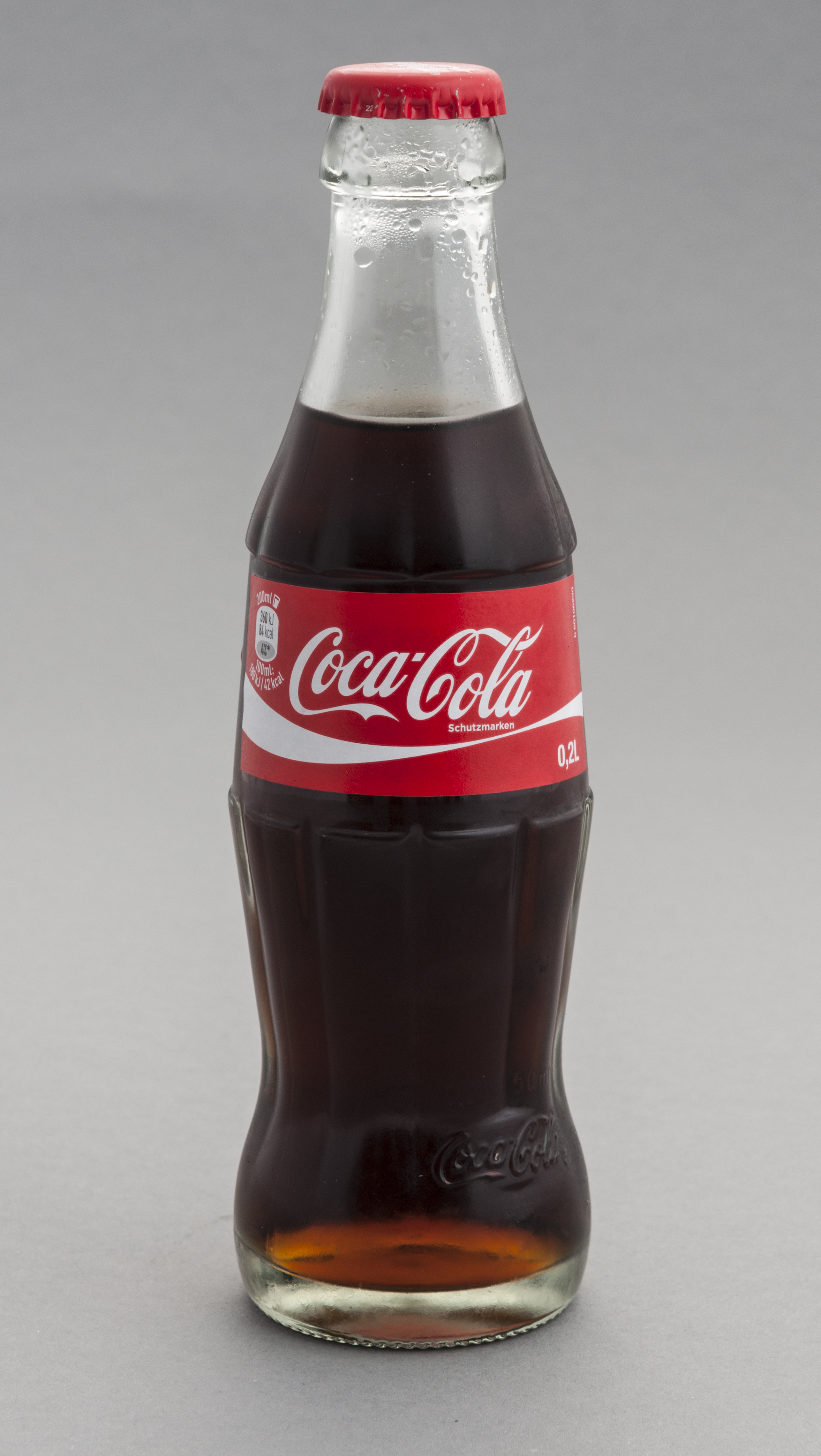 typische gekühlte Flasche Coca-Cola, 0,2 Liter